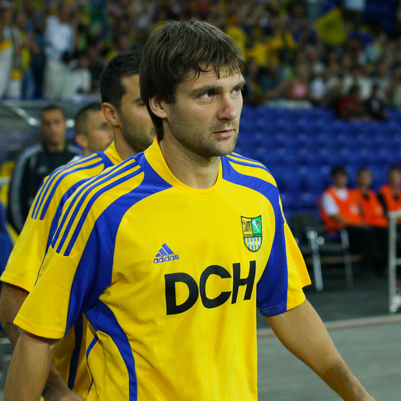 Олег Шелаев